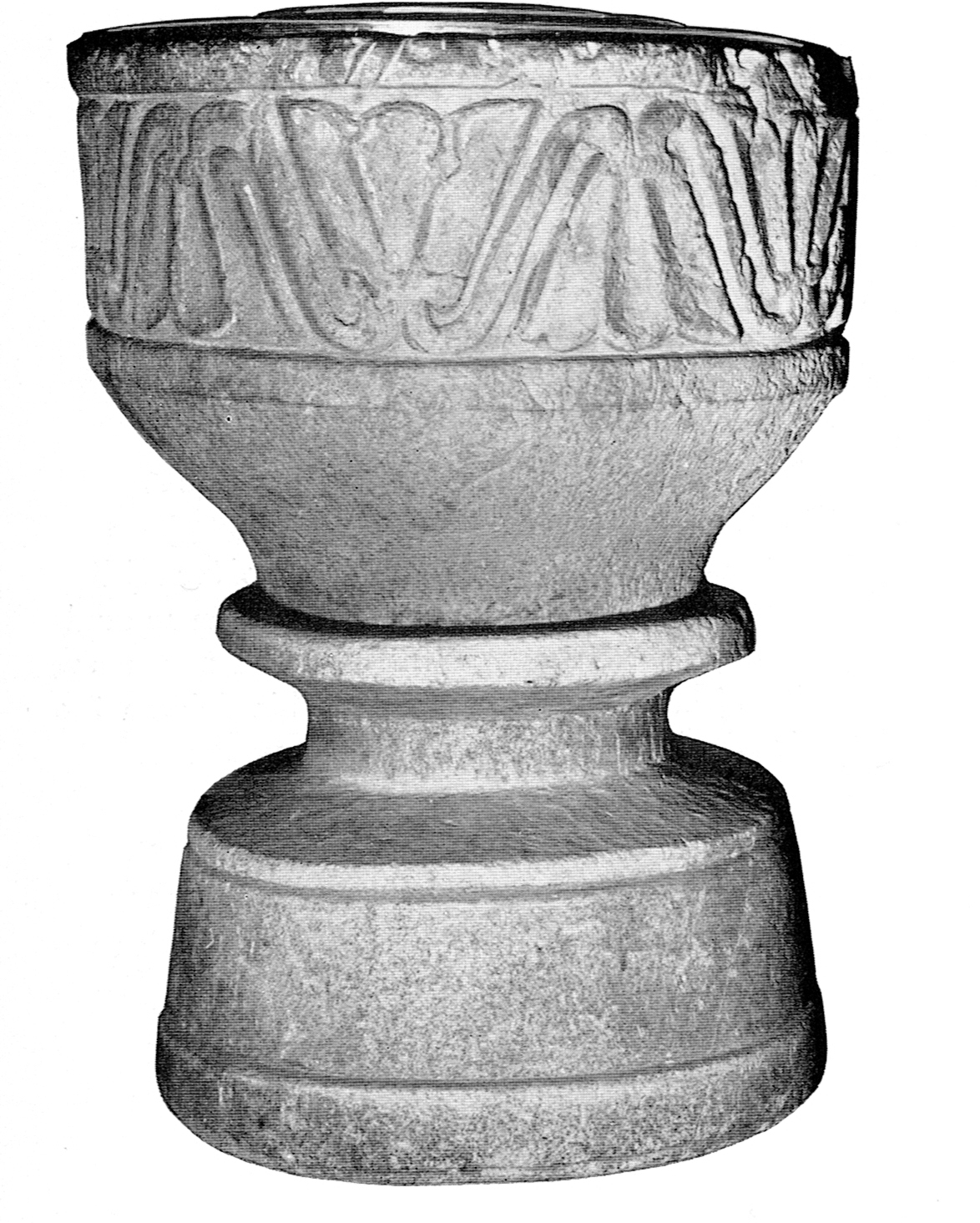 Gunnarsnäs kyrka. Dopfunt.